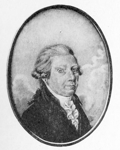 Carl Diedric Engelhart (1722-1812). Äldre man, bröstbild, fas t. v., med hvit uppkammad peruk, kanonlock vid örat, hvit lindad halsduk, krås. Urringad väst med uppstående krage, mörk rock med nedliggande krage och slag. Bakgrund himmel. Miniatyr, 70x52 mm., af okänd mästare.